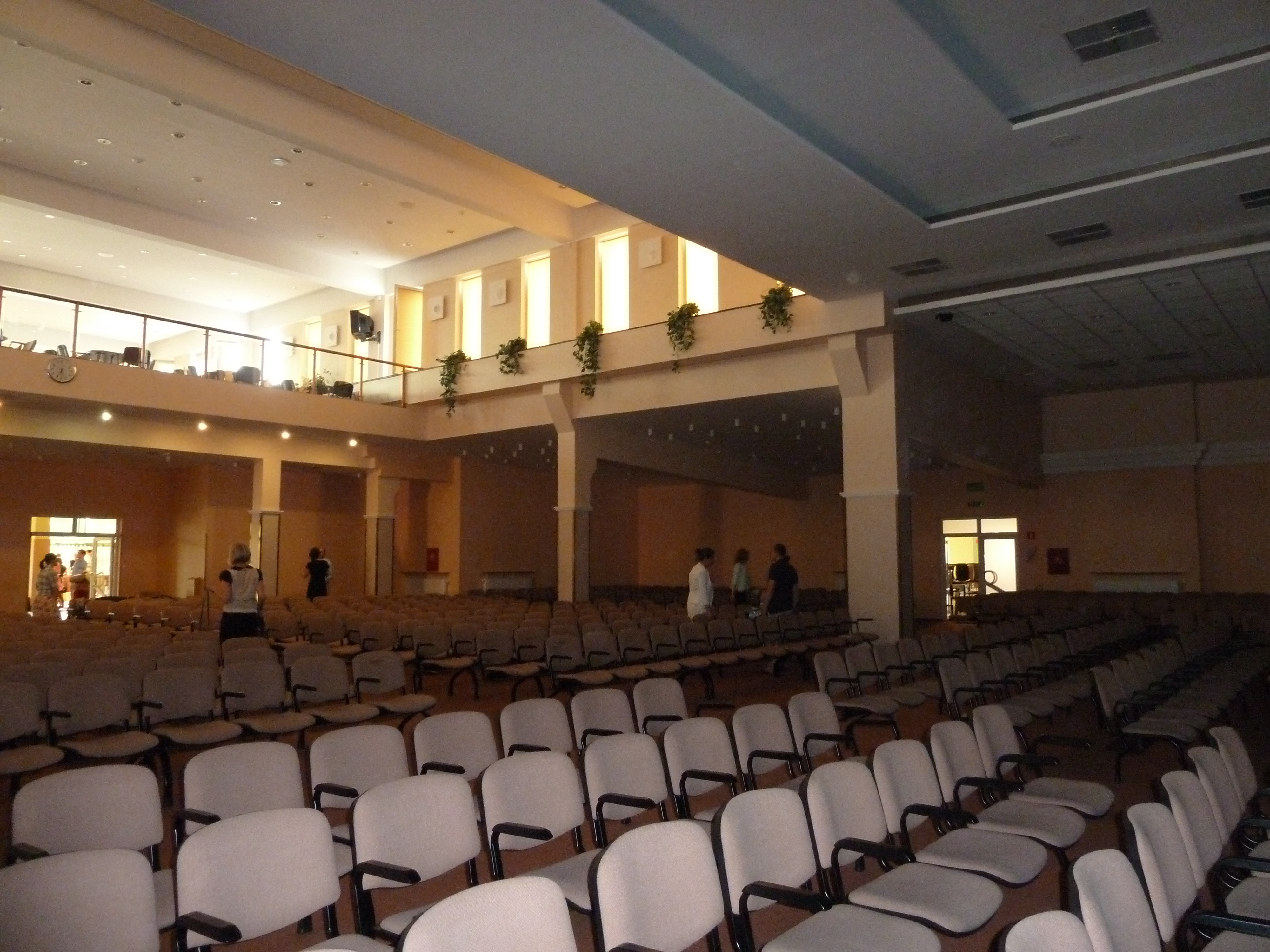 Górna, Łódź, Poland